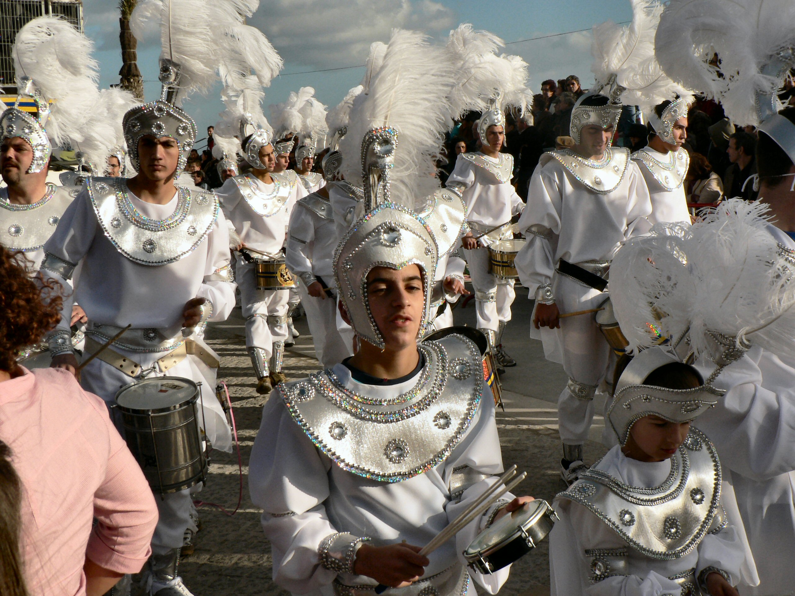 Desfile de Carnaval em Sesimbra 2007